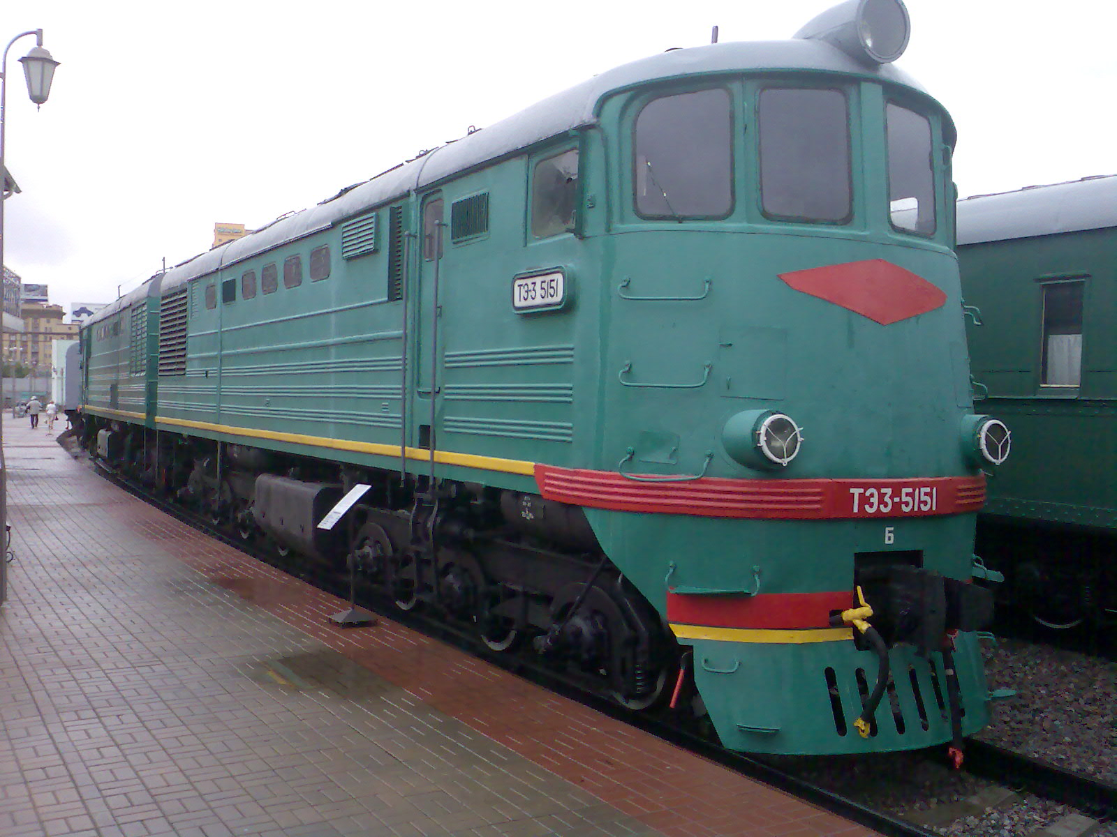 Тепловоз ТЭ3-5151. Железнодорожный музей на рижском вокзале г. Москва